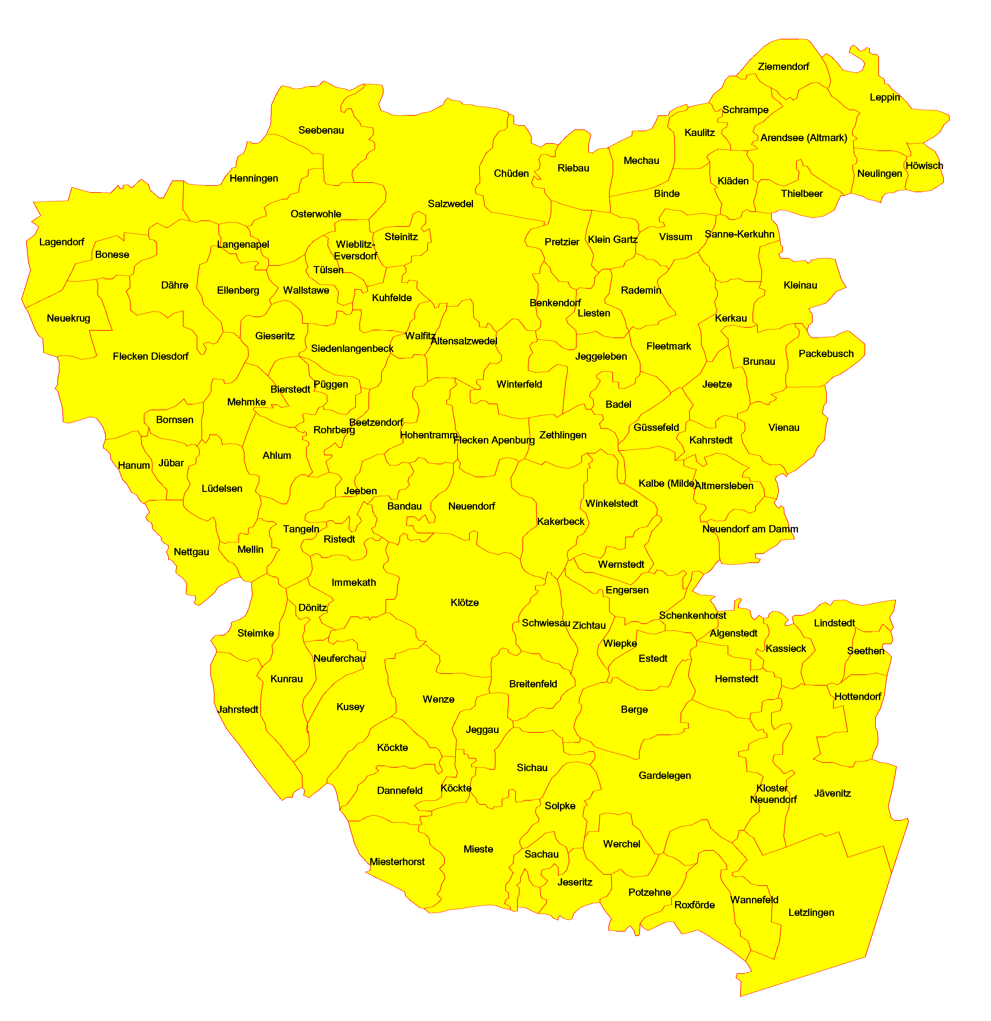 Gemeinden im Altmarkkreis Salzwedel)